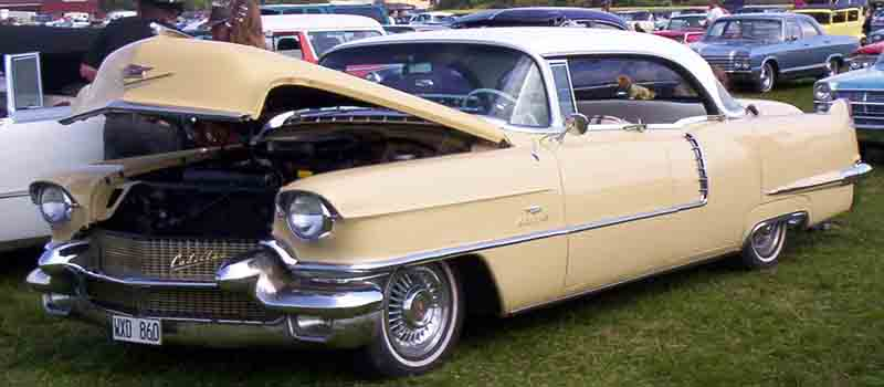 1956 Cadillac Series 56-6239DX Sedan De Ville